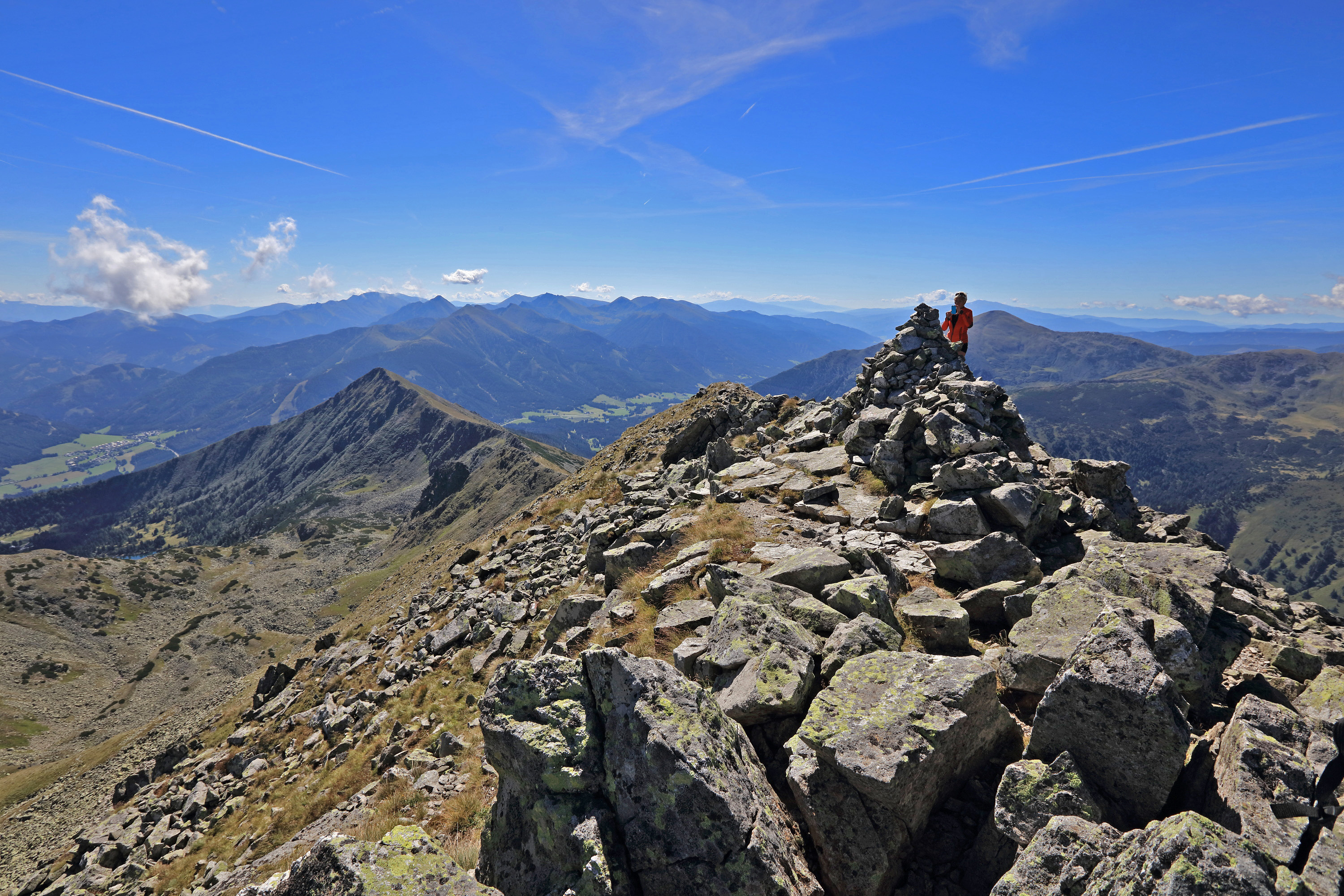 Gemeinde Hohentauern, 8785, Austria, Gipfel des Kleinen Bösensteins (2395m).